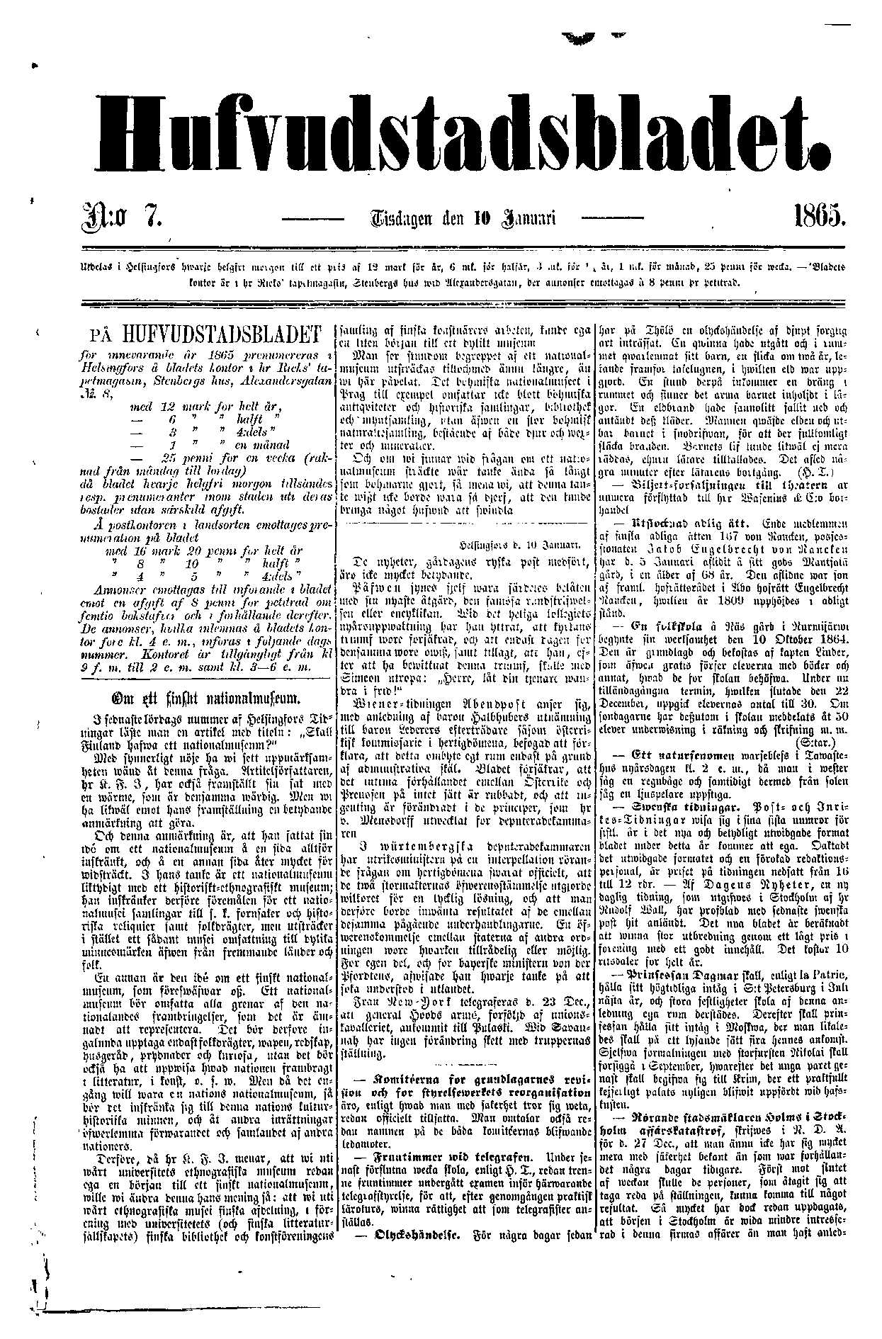 Hufvudstadsbladet